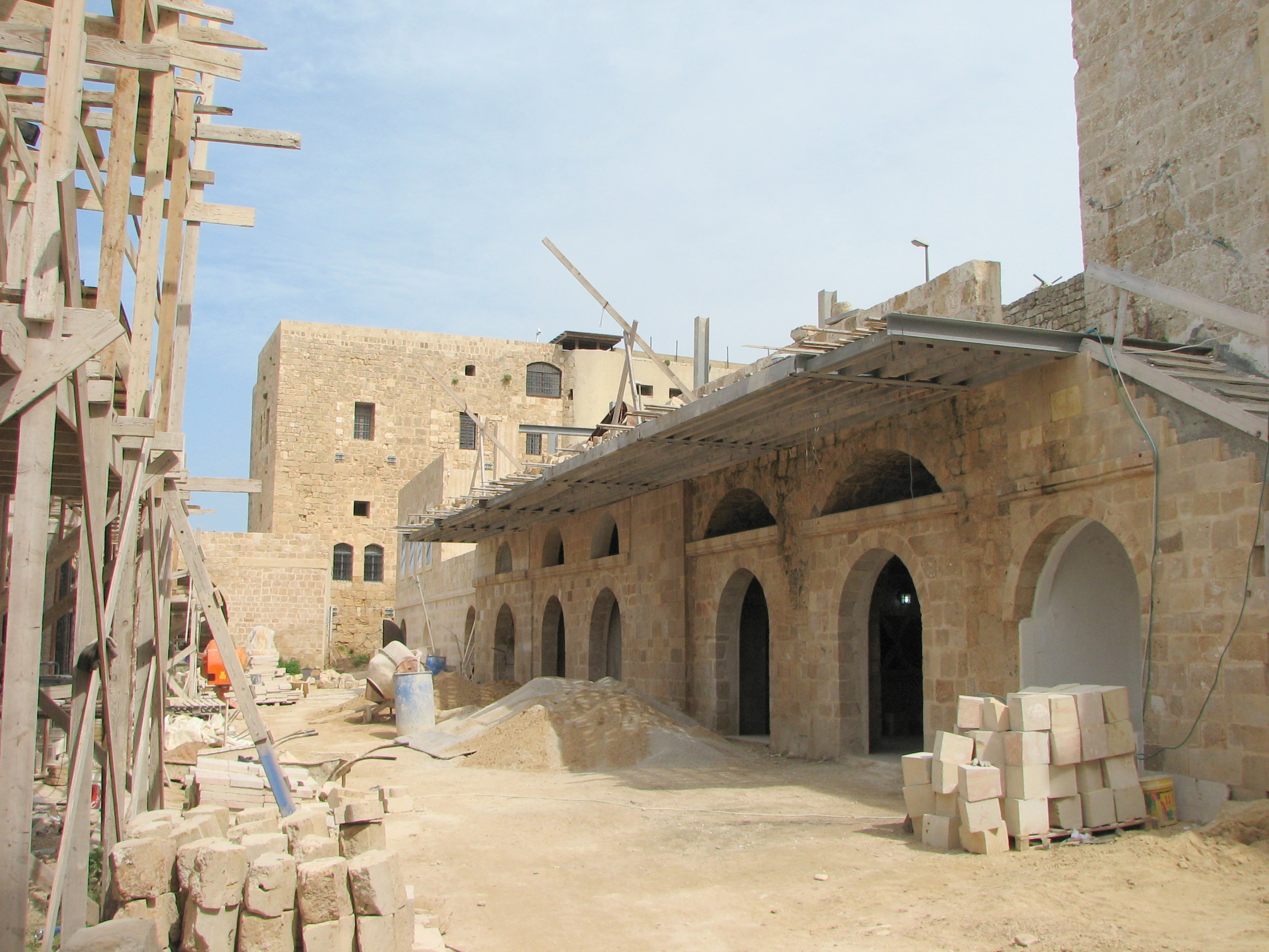 Akko, El Shazliya Mosque under construction. The cost of construction is estimate 80 M $ מסגד אל -שאזליה בעכו. מרכז השאזלים נמצא בלבנון. במשך שנים מרכז זה נזנח והשוכרים הרחיבו את בתיהם. השאזלים החליטו לשפץ אץ המקום הם פינו את הדיירים תוך מתן פיצויים והחלו בשיפוץ האתר הכולל מסגד מבנים וקברים. ההשקעה המוערכת במבנה באתר היא 80 מליון דולר This image was taken as part of the Elef Millim project trip to the Old City of Acco, which was held on Friday, 5th March 2010. To view all images uploaded as pary of the Elef Millim Project קירות פנימיים בזמן השיפוץ